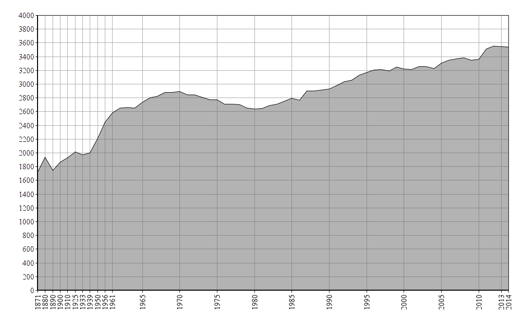 Dieses Bild zeigt die Bevölkerungsstatistik von Biberach